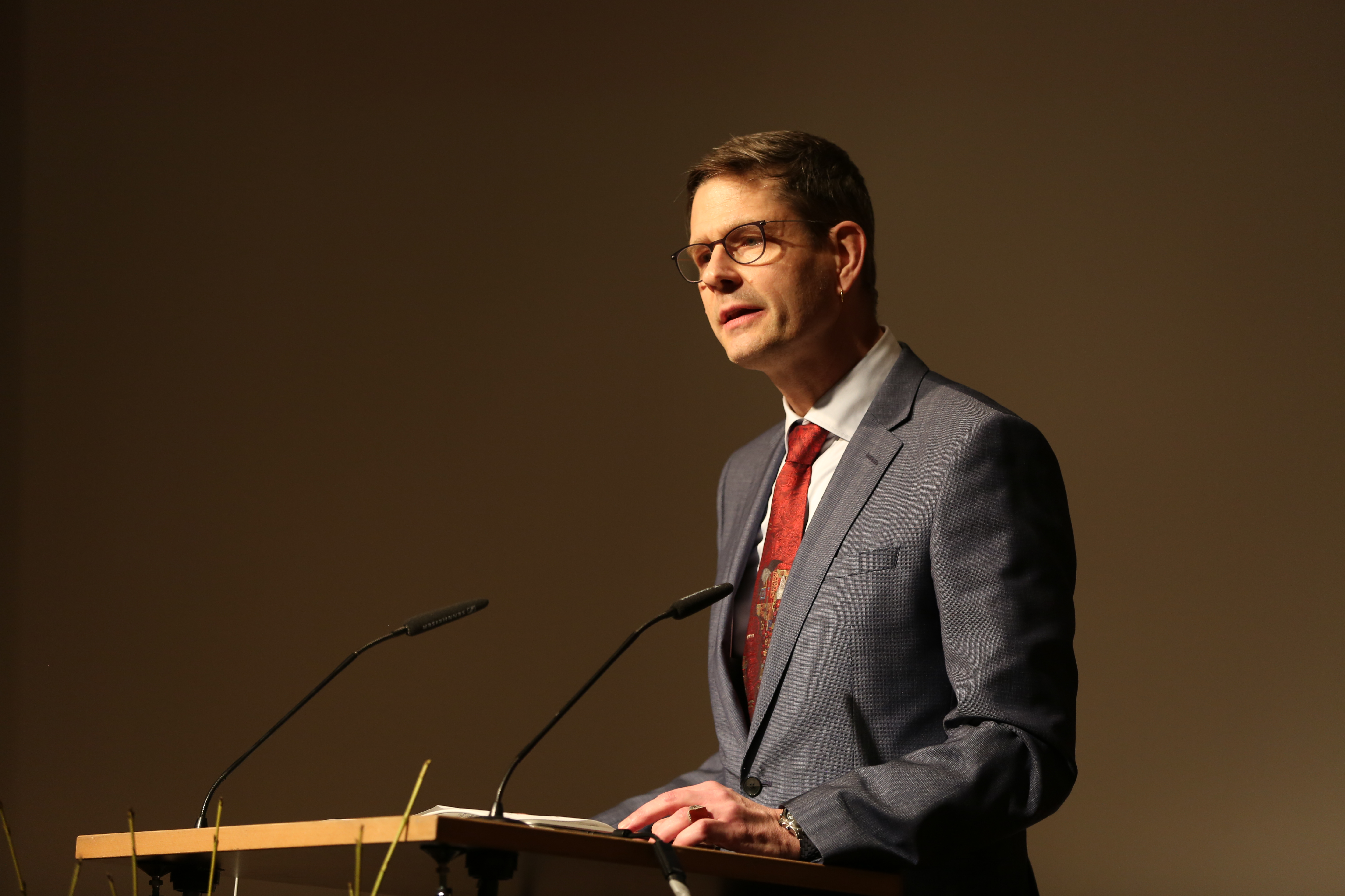 Arne Ackermann, Direktor der Münchner Stadbibliothek, bei der Verleihung des Ernst-Hoferichter-Preises 2019